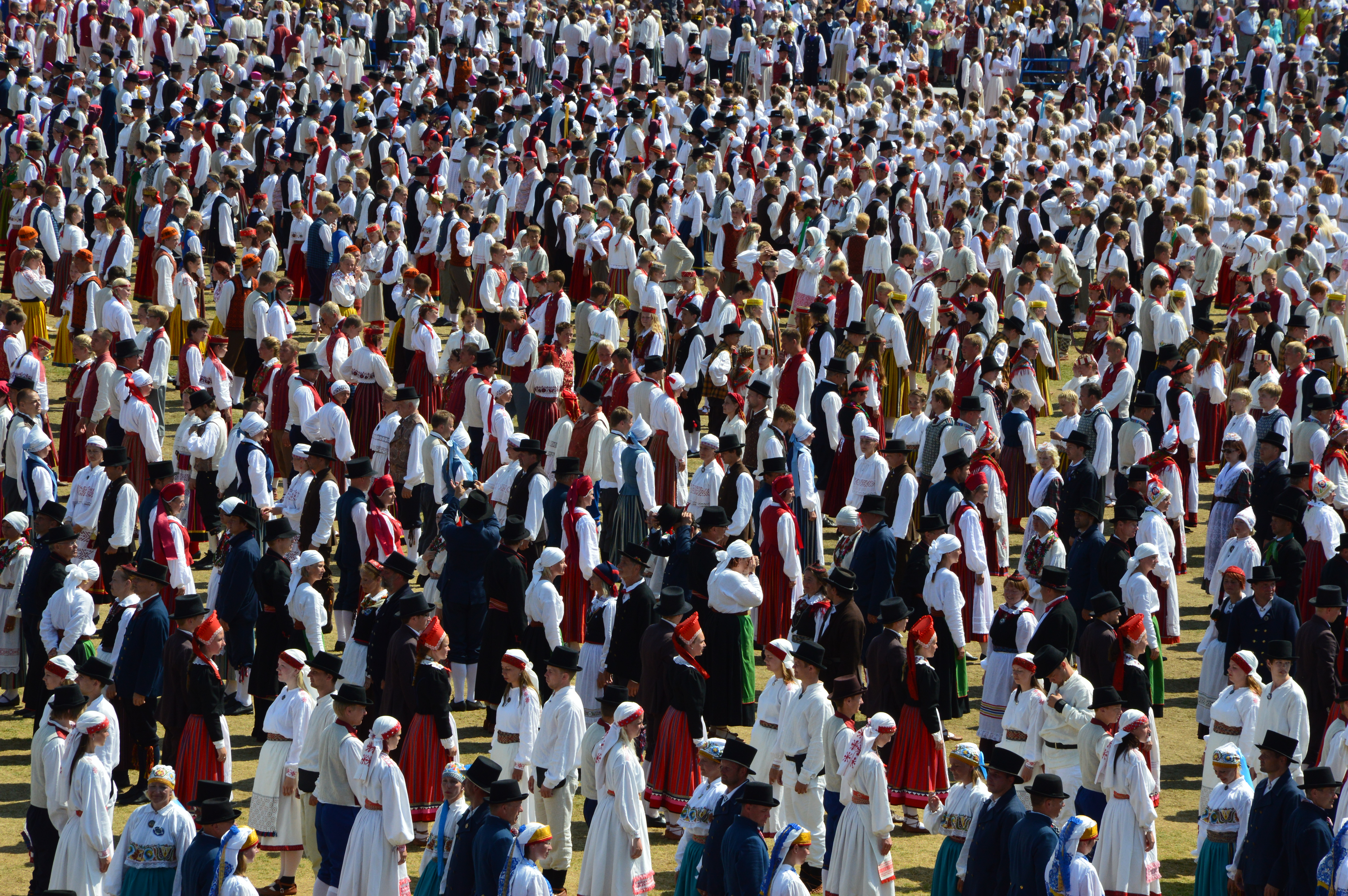 XIX üldtantsupidu Kalevi keskstaadionil.